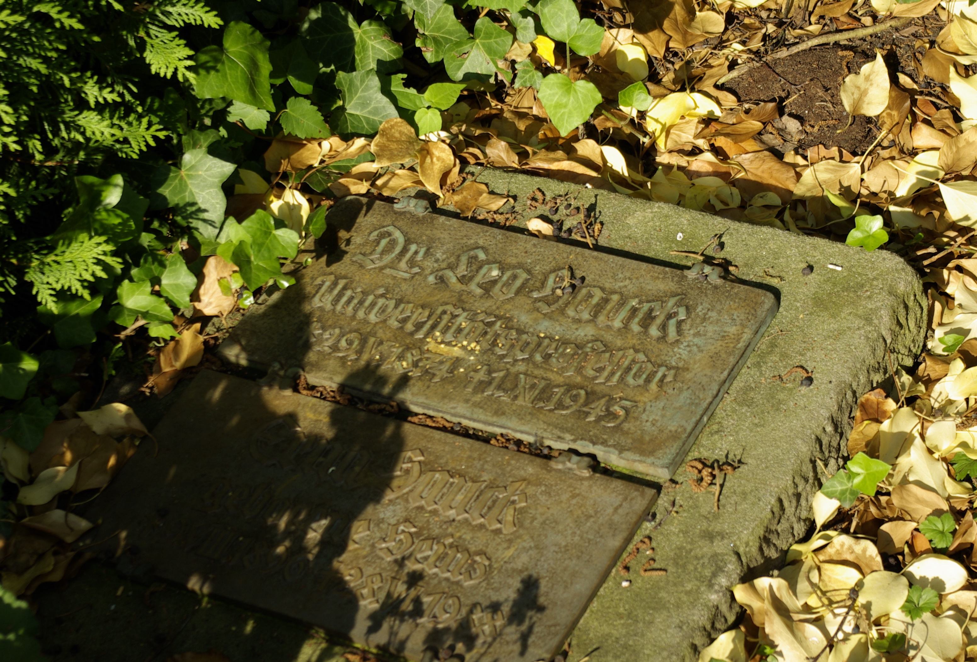 Zentralfriedhof in Erlangen: Feld 21, am Rand, Nr. 19. Familie Prof. Leo Hauck.